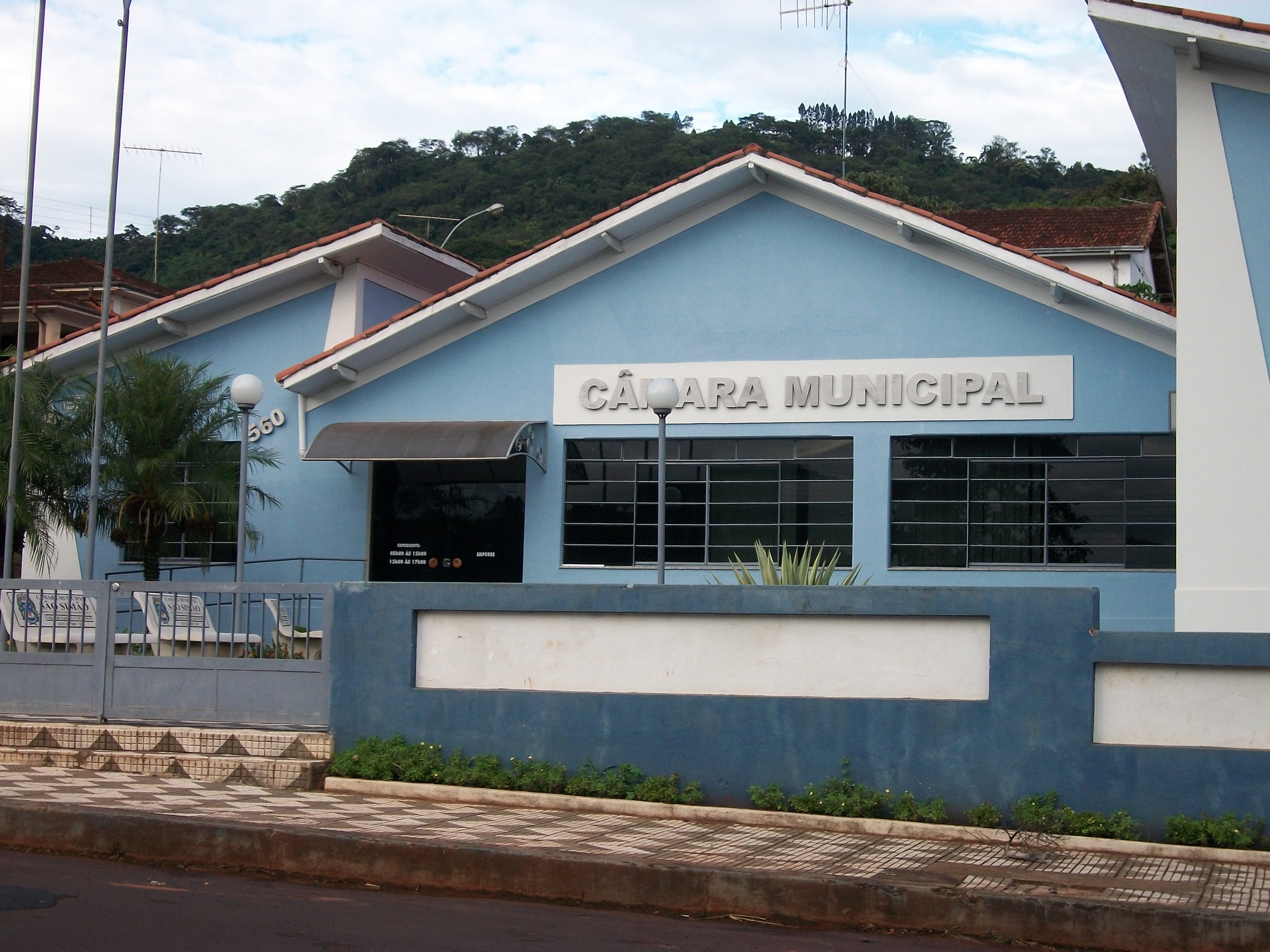 Câmara dos vereadores do município de São Simão - SP, 20 de fevereiro de 2010.